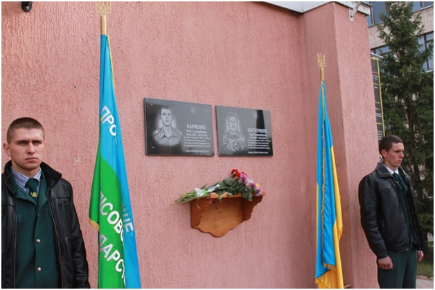 меморіальна дошка